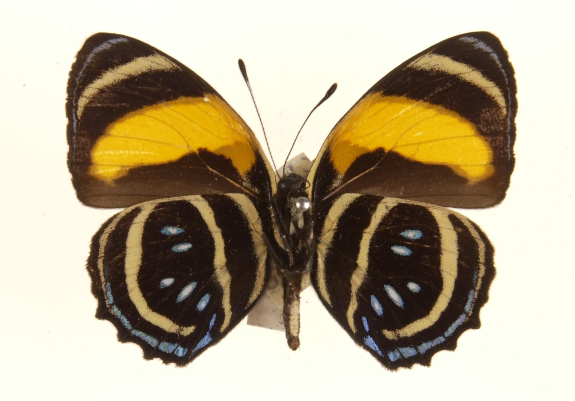 Callicore aegina salamis